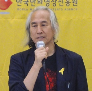 박재동 부천국제만화축제 운영위원장